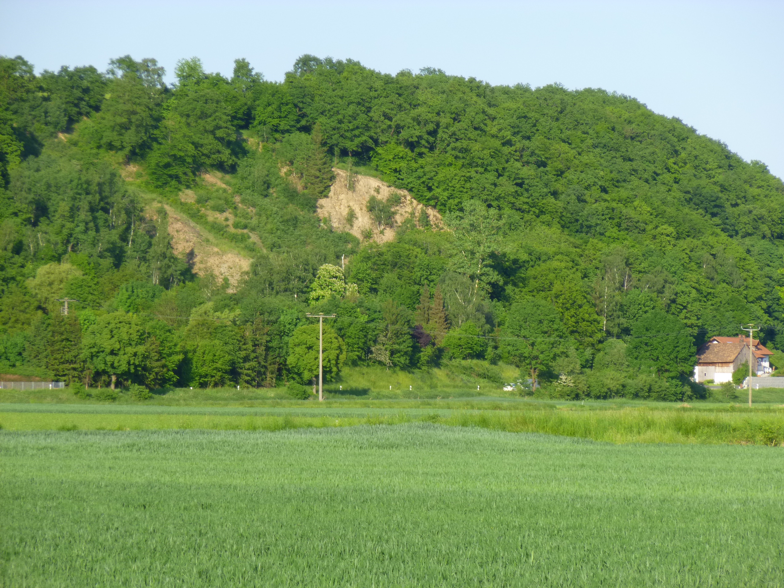 Der ehemalige Steinbruch Espern liegt im Gemeindegebiet von Niederwinkling. Er gehört zu den Geotopen im Landkreis Straubing-Bogen und trägt die Nummer 278A005.